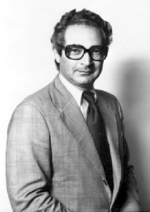 Carlos Varsavsky, Ing. Físico Argentino.